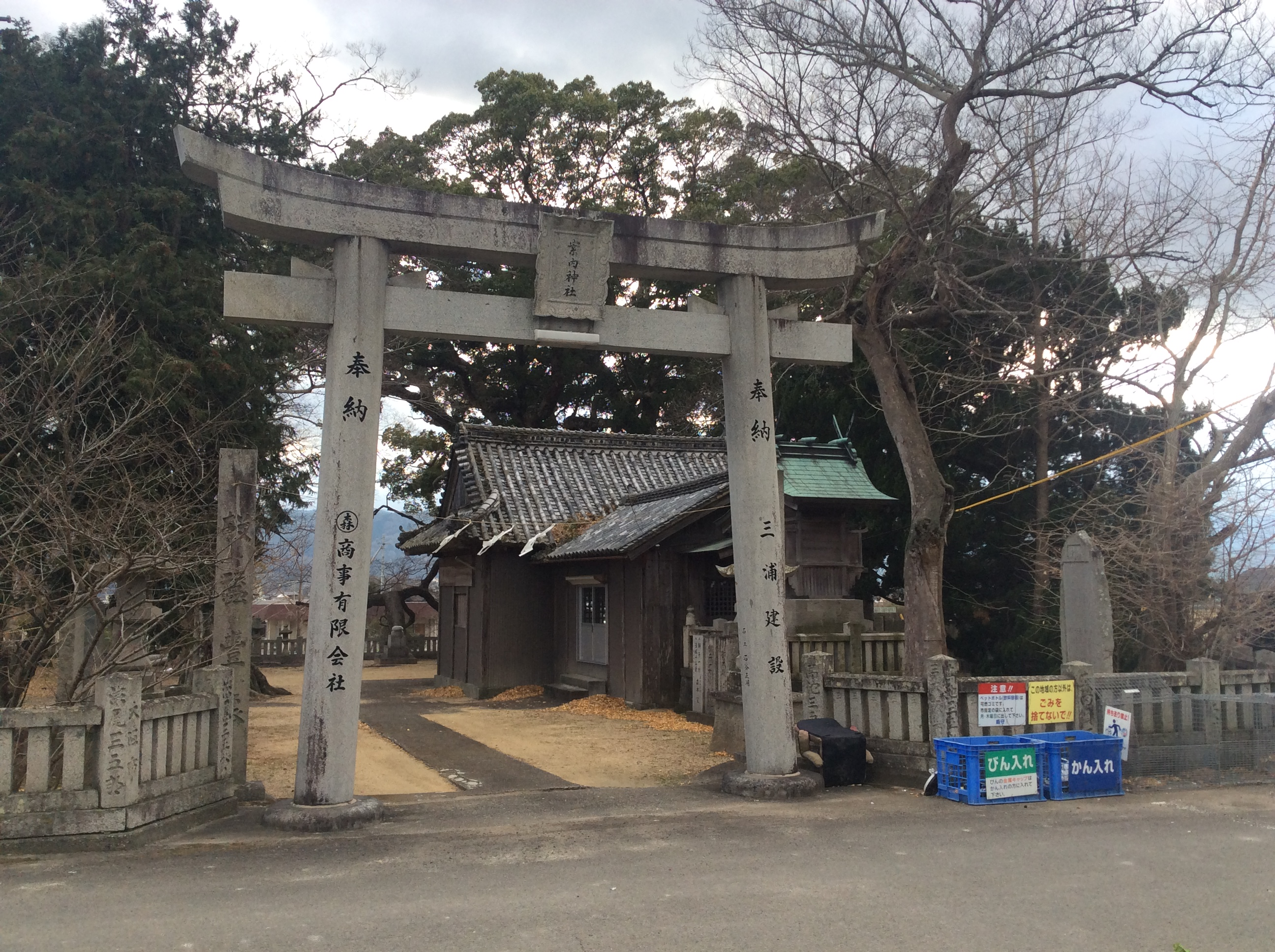 案内神社（阿波市）